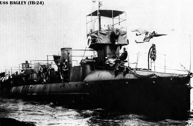 USS Bagley